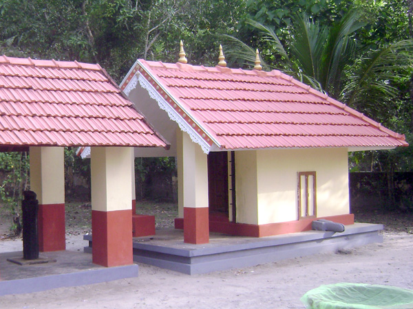 Sasthavu